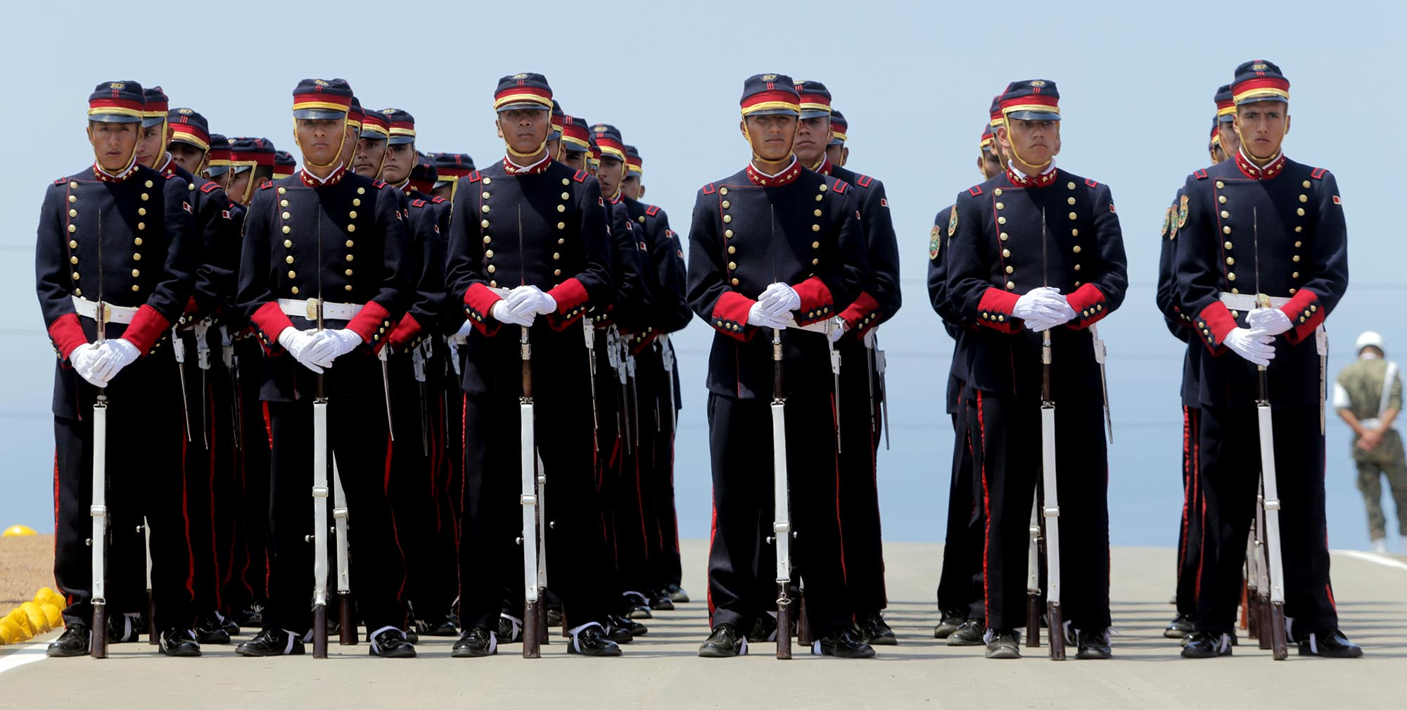 El ministro de Defensa, Pedro Cateriano Bellido, presidió esta mañana el acto de conmemoración por el 133º Aniversario de la Batalla de San Juan ocurrida en el Morro Solar en el distrito de Chorrillos, durante la Guerra del Pacífico. La ceremonia rindió homenaje a los héroes anónimos que entregaron sus vidas por la Patria en la defensa de Lima el 13 de enero de 1881, y contó con la participación de autoridades civiles, policiales y los comandantes generales de las Fuerzas Armadas. A nombre del Ejército, el General de Brigada EP Julio César Yáñez Tamariz, resaltó en su discurso de orden el ejemplo de unidad, valor, lealtad y fidelidad de estos valientes peruanos, en jornadas de resistencia heroica frente al enemigo invasor. Previamente, se colocaron ofrendas florales a nombre del Ejército ante el Monumento del Soldado Desconocido levantado en el Morro Solar y se rindieron honores a los caídos. Finalmente, el monseñor Guillermo Inca Pereda, Administrador Apostólico del Obispado Castrense, ofició una acción litúrgica donde reiteró la importancia de la gesta en la memoria histórica del Perú.